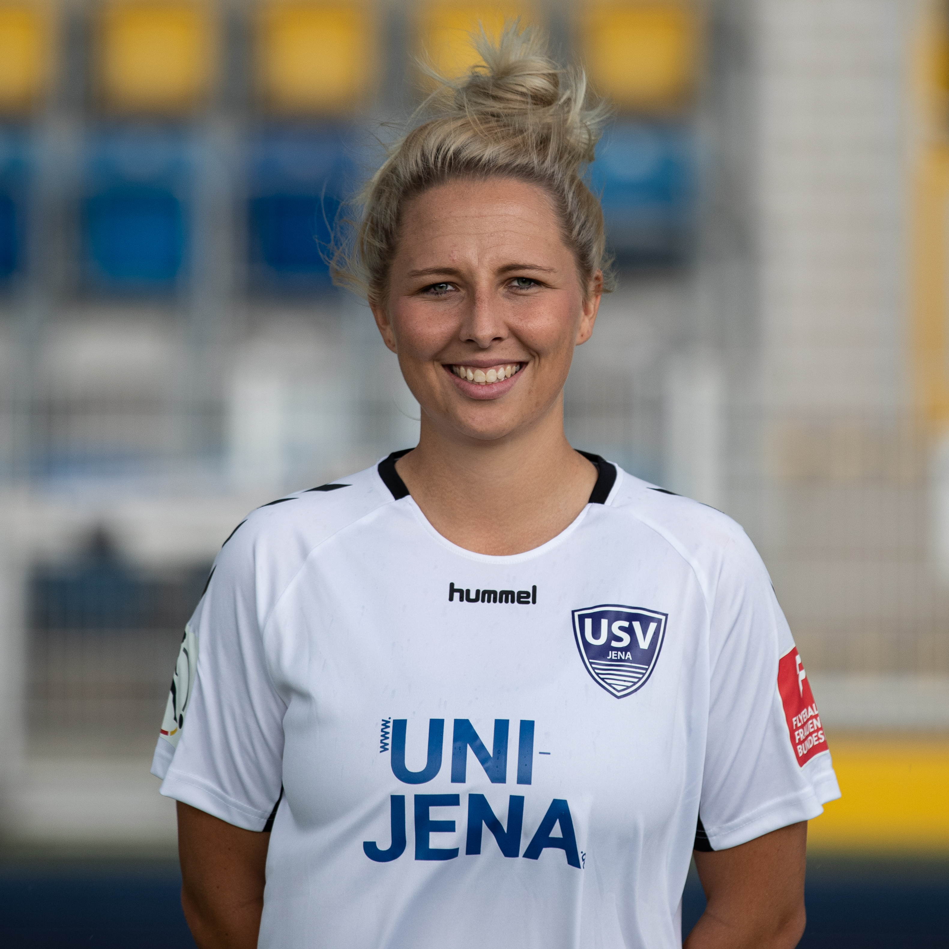 Fußball, Flyeralarm Frauen-Bundesliga, Mannschaftsfotos FF USV Jena; Isabelle Knipp (FF USV Jena, 7); Porträt, Einzelbild